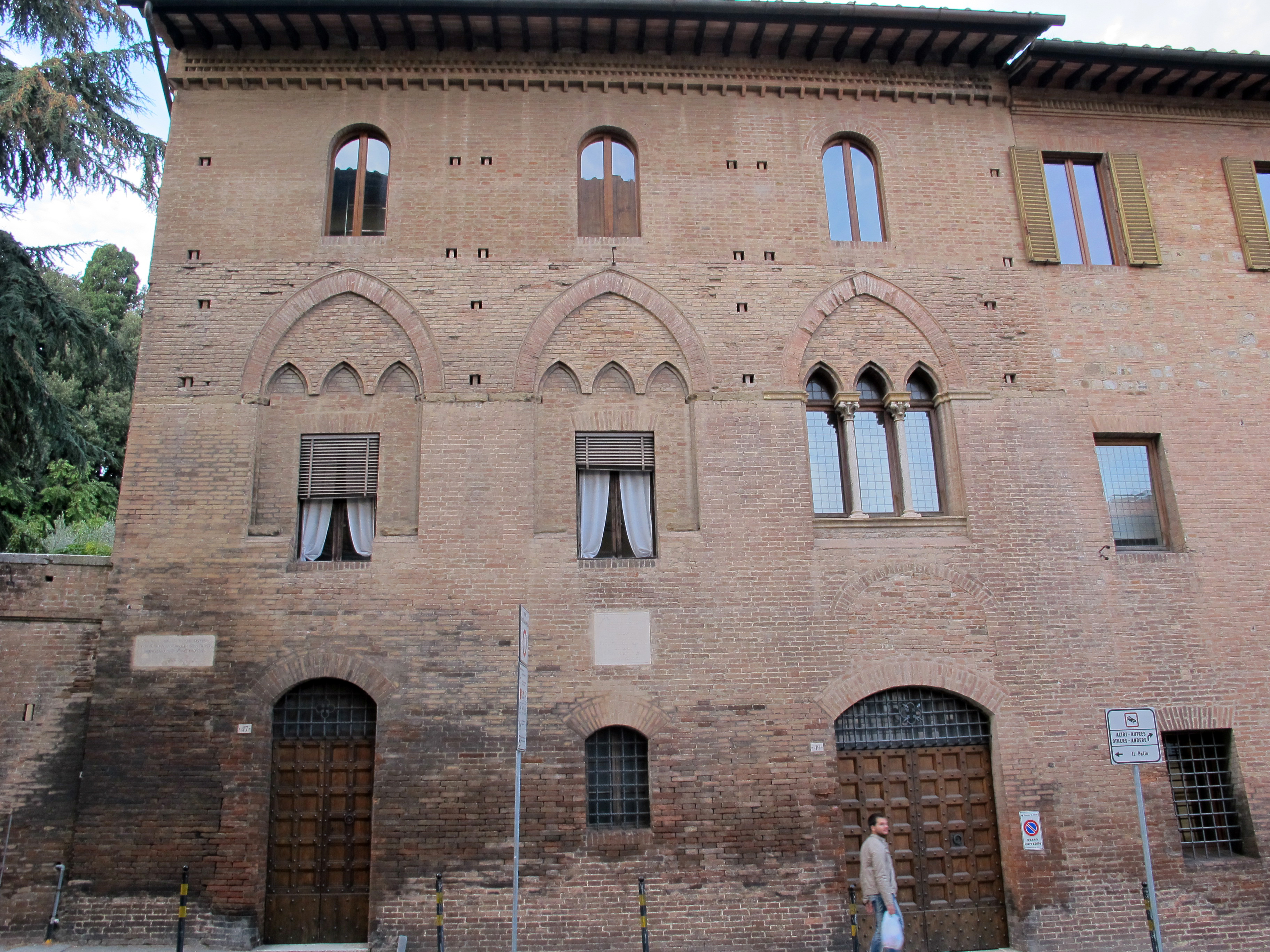 Siena